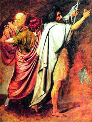 Александр Иванов. Этюды к картине «Явление Мессии».